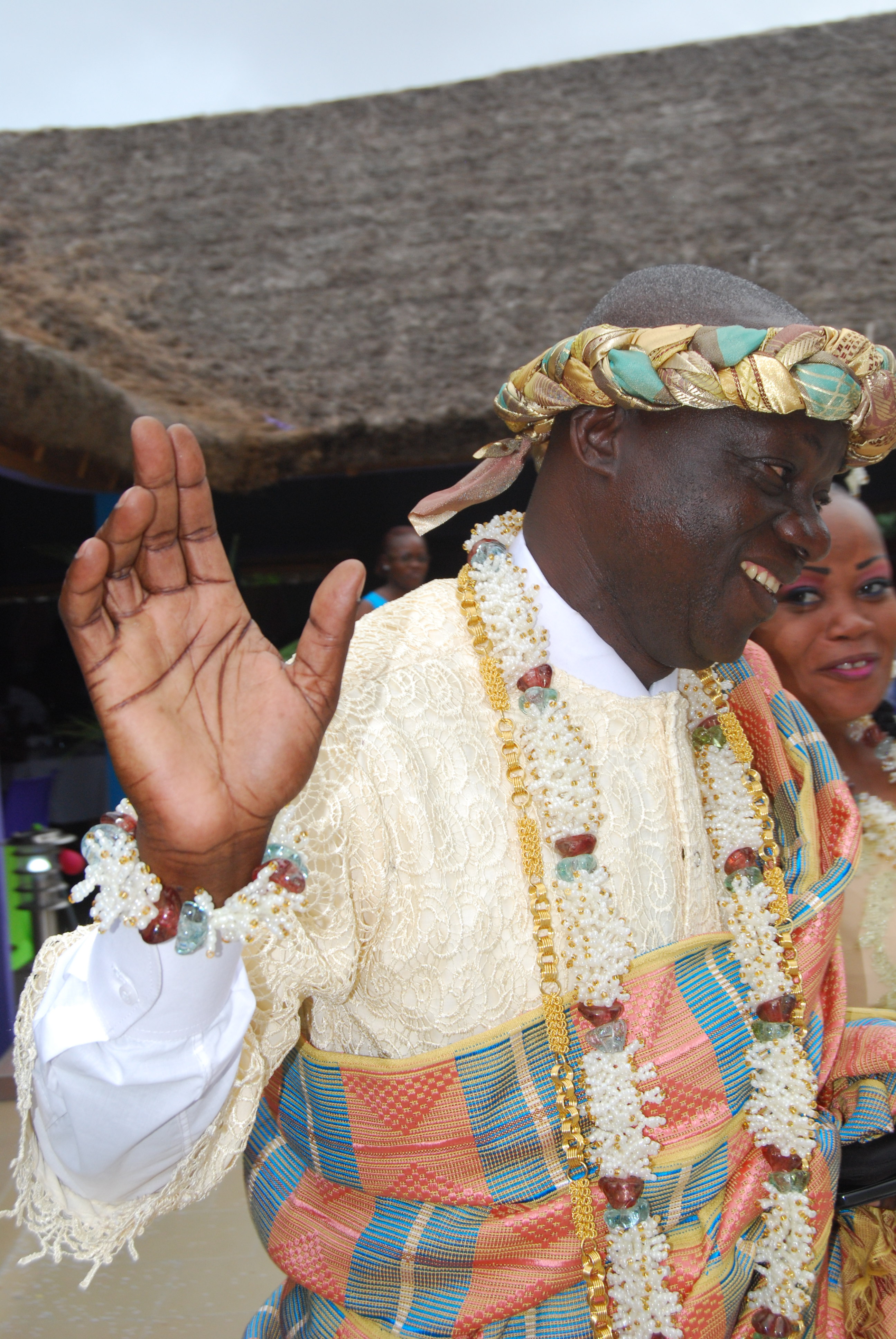 Cérémonie de mariage à Abobo, commune de la ville d’Abidjan en Côte d’Ivoire. Un nouveau marié exhibe sa tenue et ses parures traditionnelles. This is an image of Cultural Fashion or Adornment from Ivory Coast